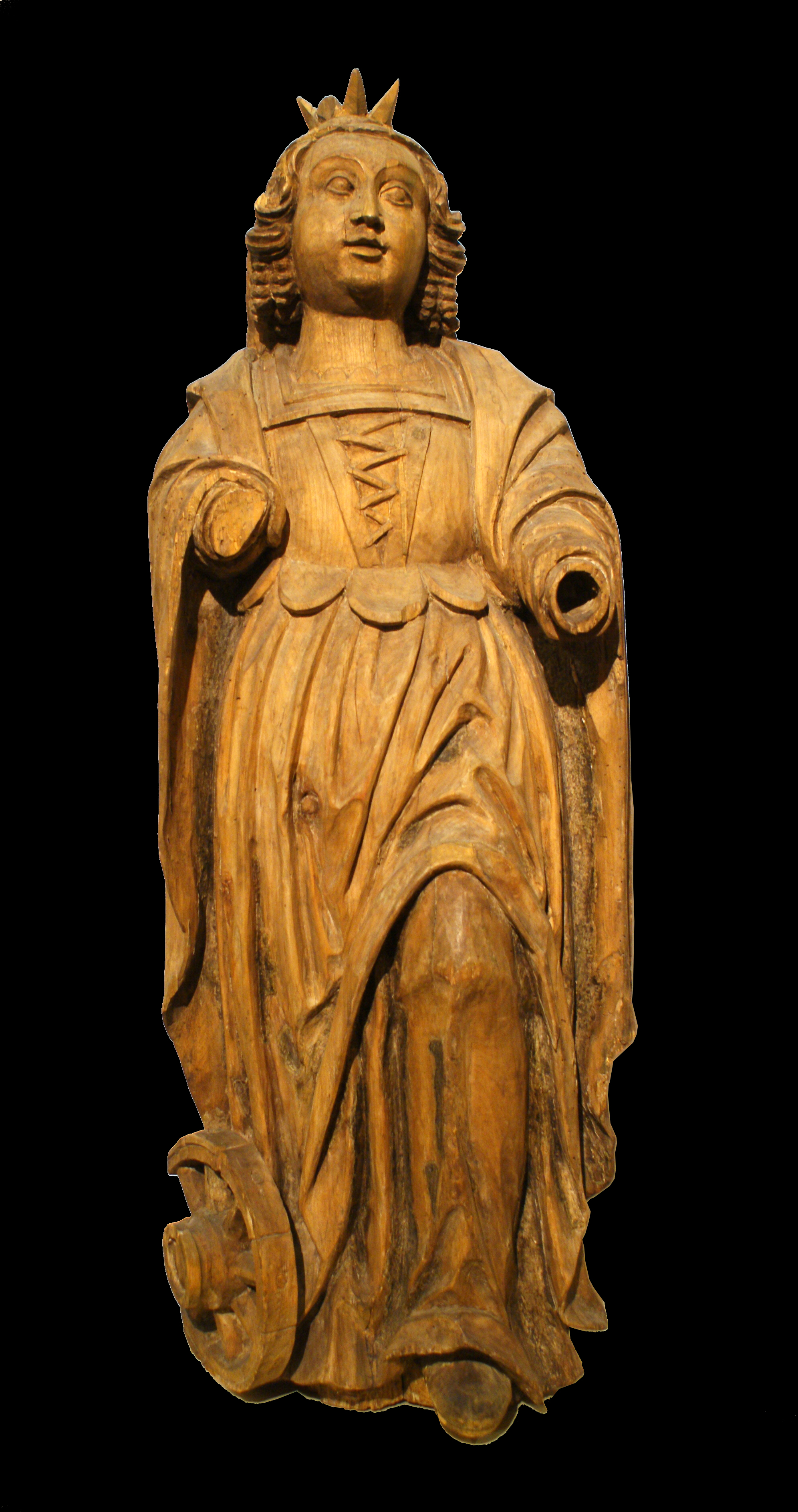 Святая Кацярына Александрыйская. Канец XVI ст. Дрэва, разьба